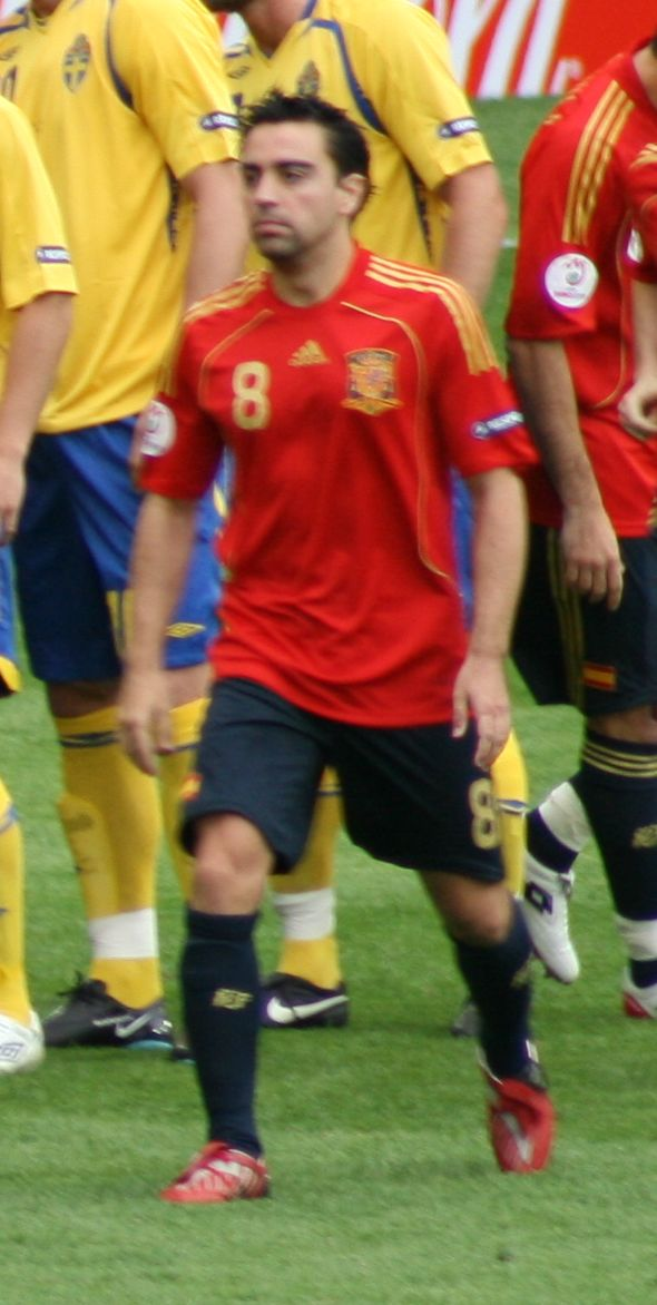 (Foto recortada) El jugador de fútbol Xavi antes del partido Suecia - España de la Eurocopa 2008, en el estadio Tivoli Neu (Innsbruck)